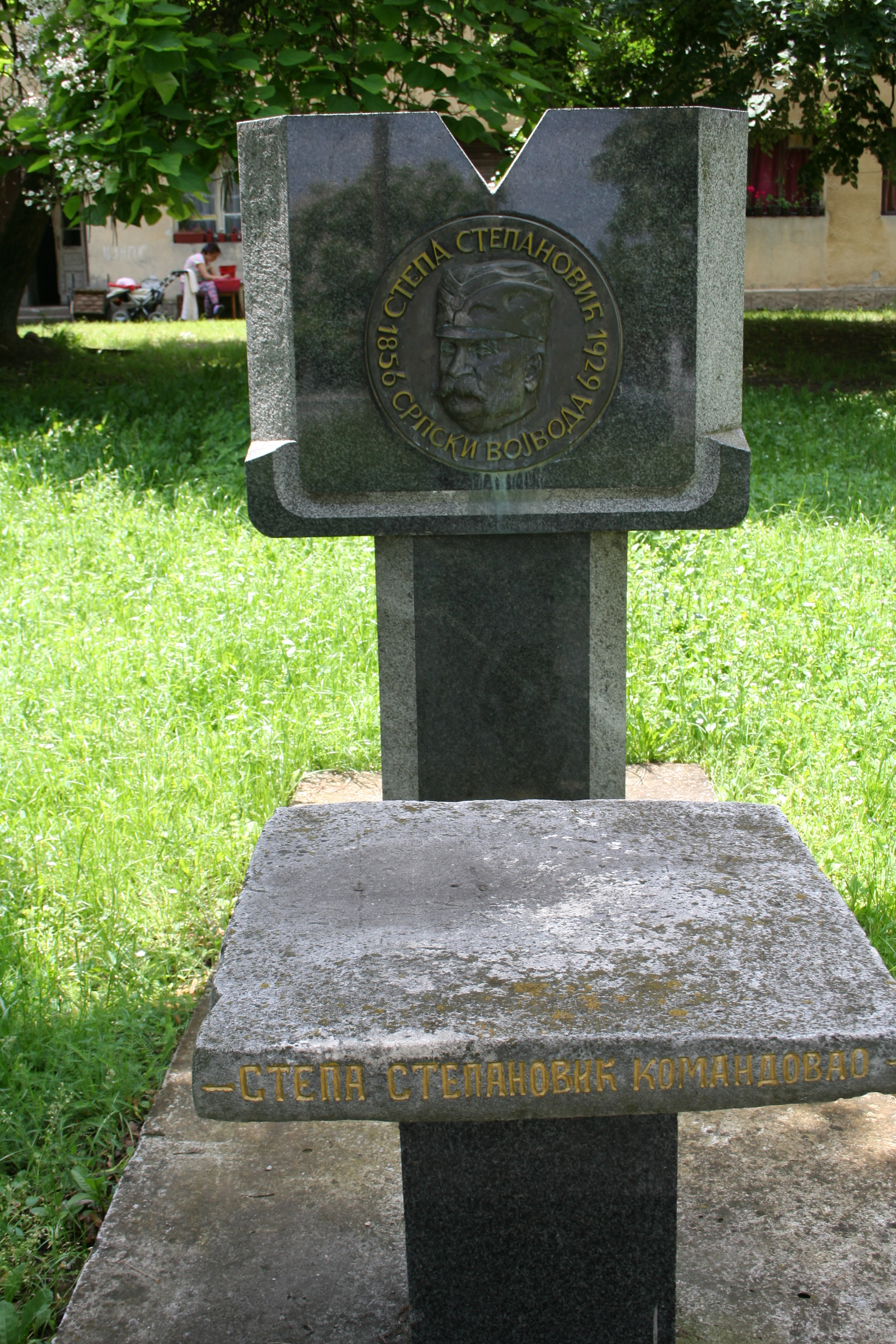 Betonska ploča sa koje je vojvoda Stepa Stepanović komandovao Cerskom bitkom, Draginje opština Koceljeva